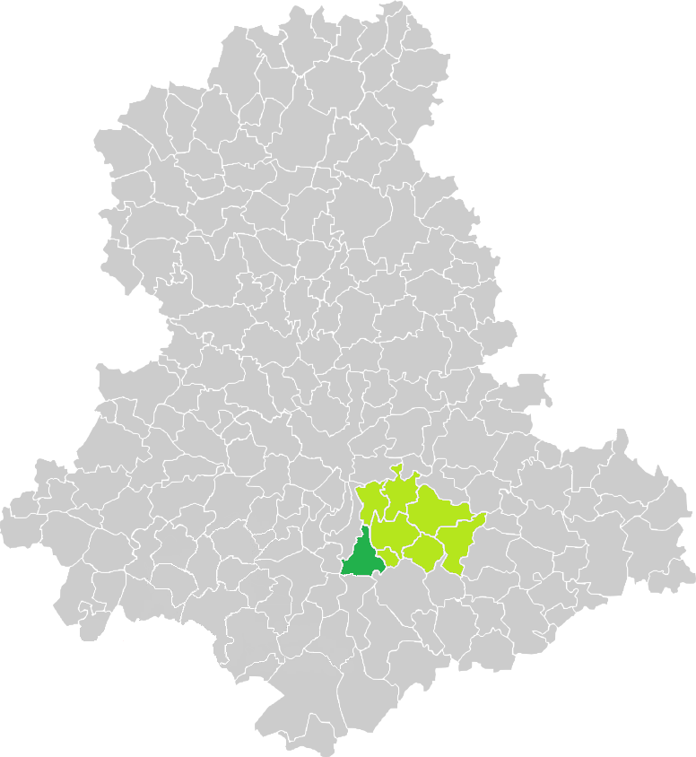 Carte de situation de la commune de Saint-Jean-Ligoure (en vert foncé) dans le votre Canton (en vert clair) sur une carte des communes de la Haute-Vienne